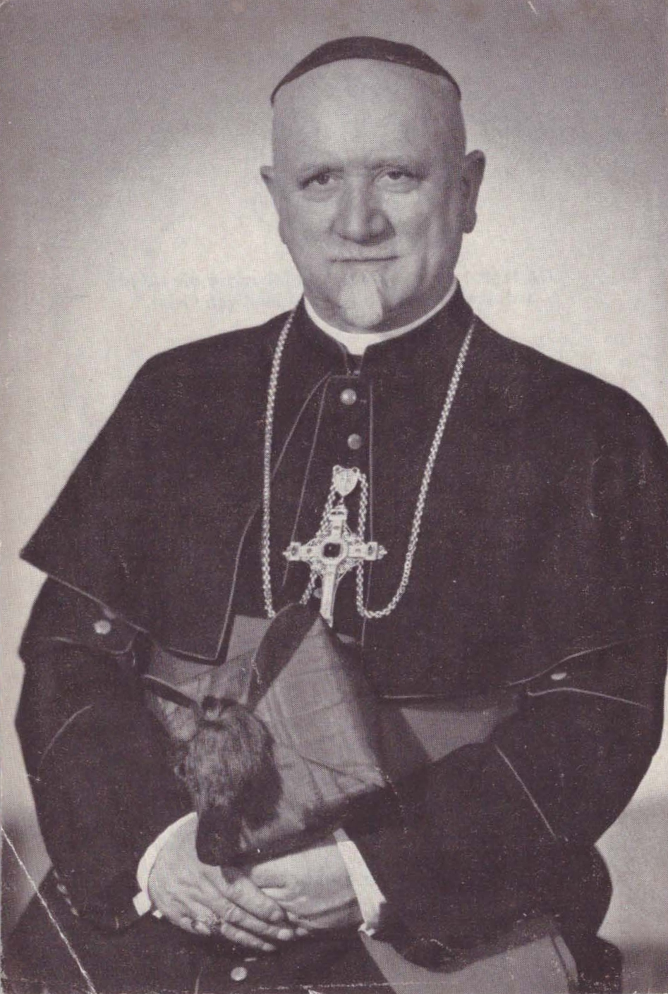 Augustin Olbert S.V.D., Bischof von Tsingtau